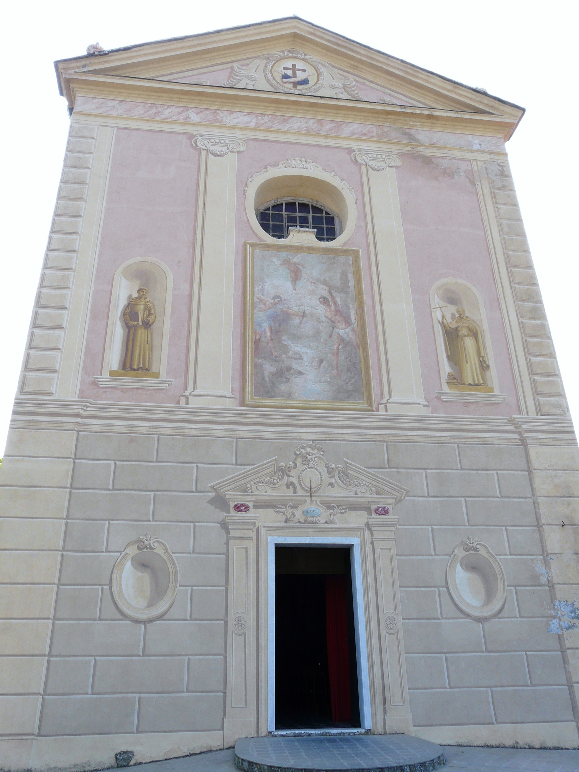 Chiesa di Sant'Antonio di Perinaldo, Liguria, Italia